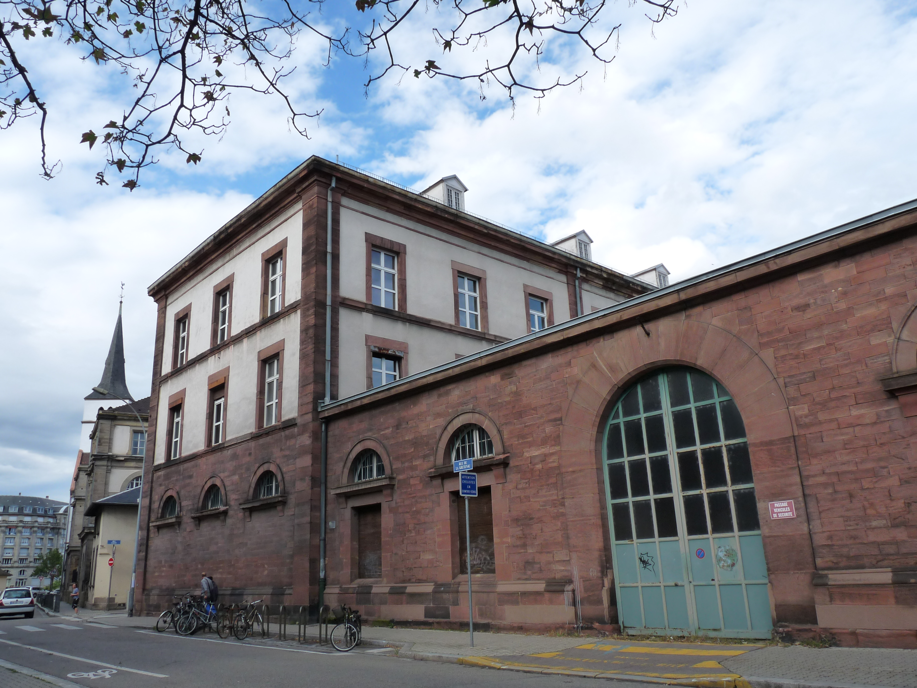 Ancienne Manufacture des Tabacs de Strasbourg (quartier de la Krutenau)